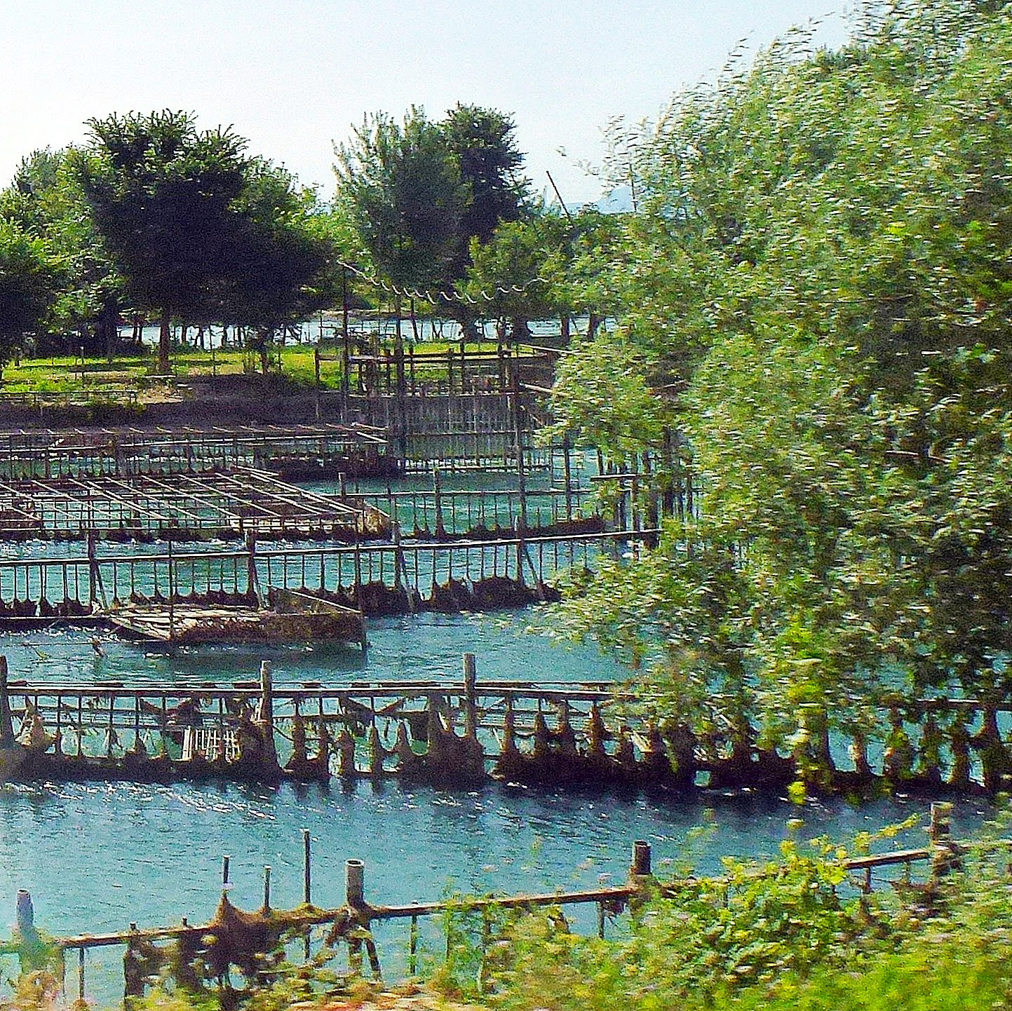 Zus, Albania